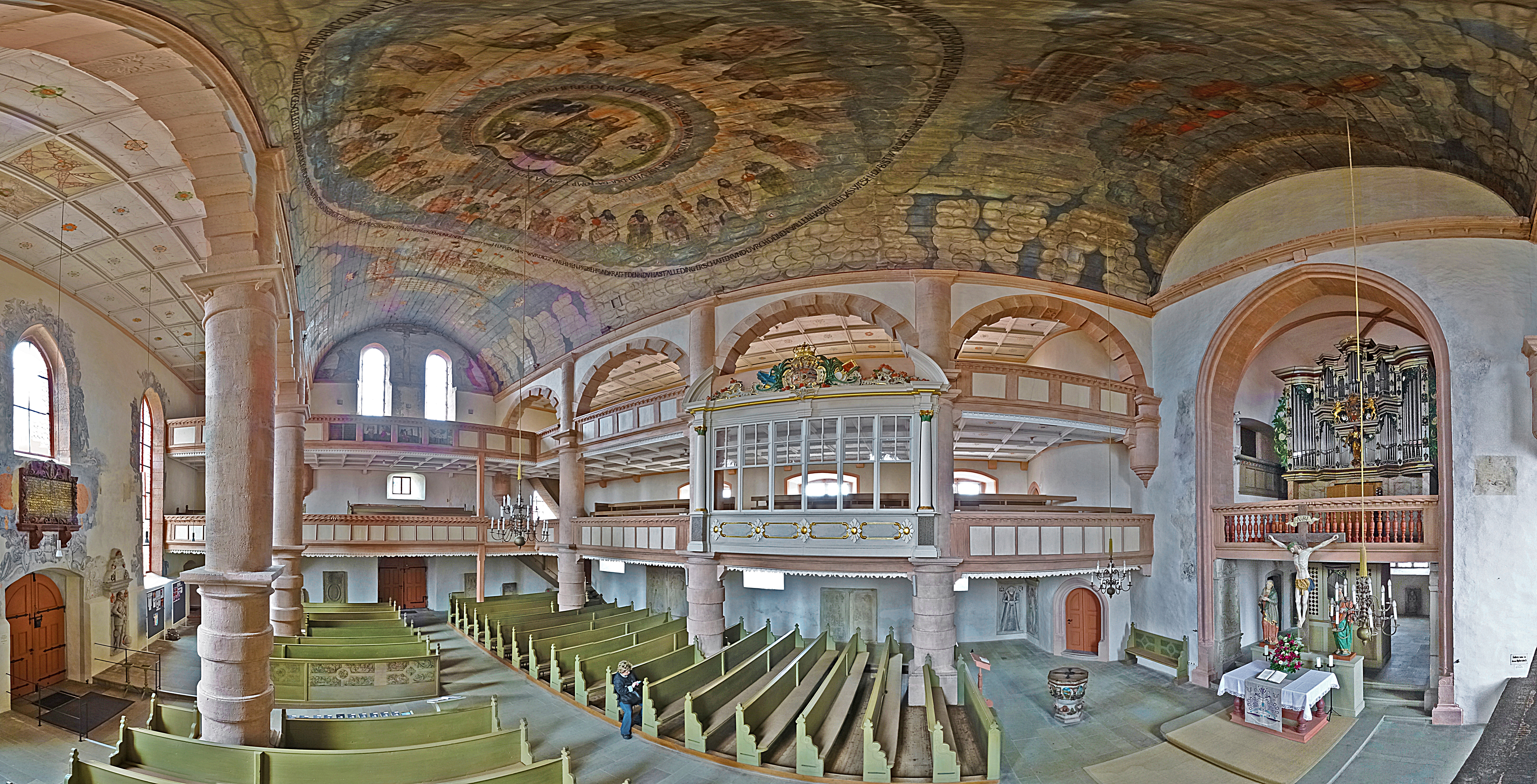 Innenraum Panorama Stadtkirche St. Michael, Ostheim vor der Rhön